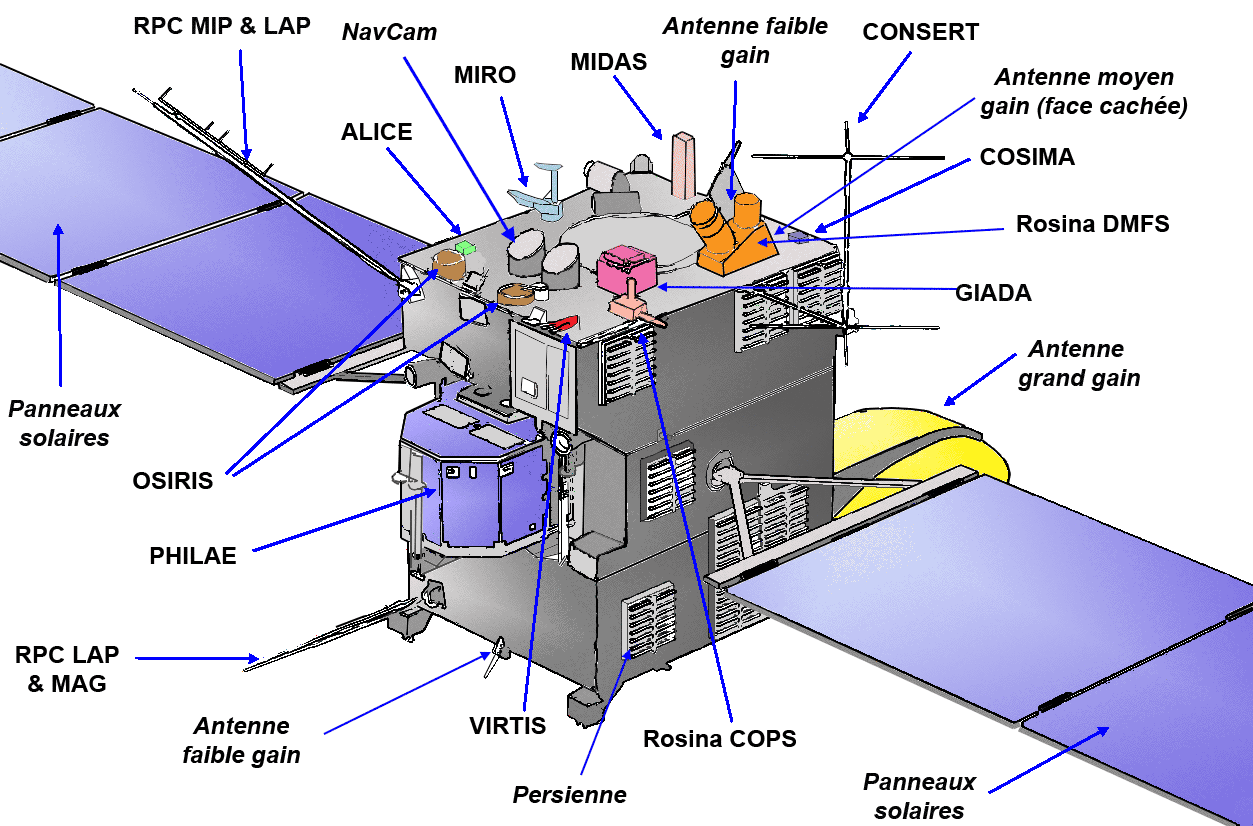 Schéma sonde spatiale Rosetta